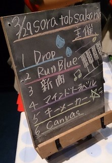 amiinaセトリボード(20150329(2))